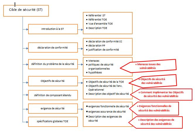 Cible De Sécurté